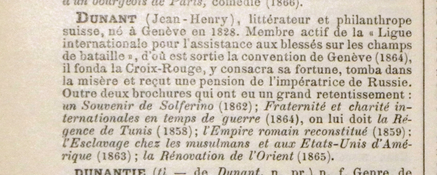 Article sur Henry Dunant du Larousse en 7 volumes (vers 1912) volume 3 page 880